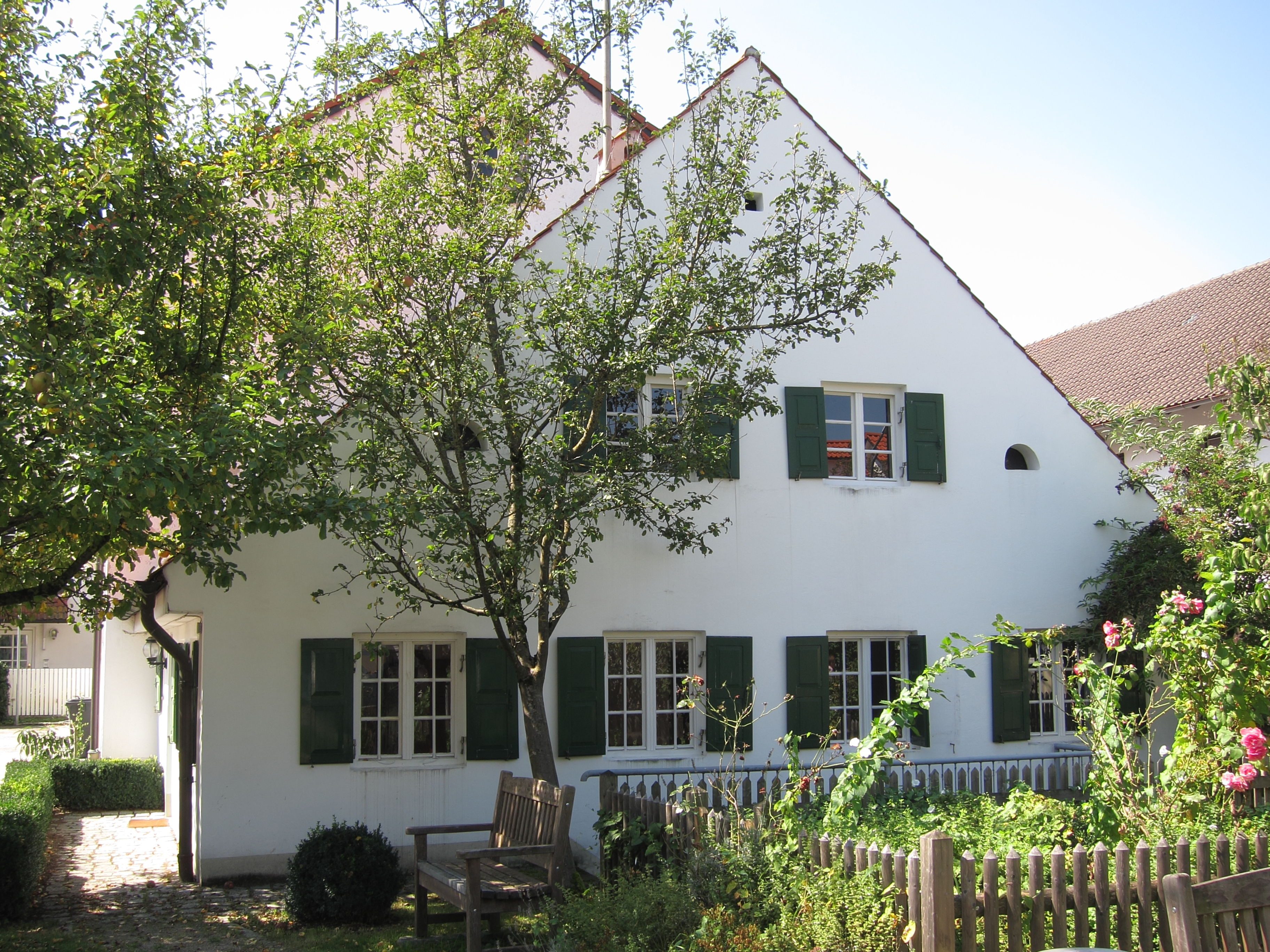 Hauptstraße 7, Wohnteil eines Bauernhauses